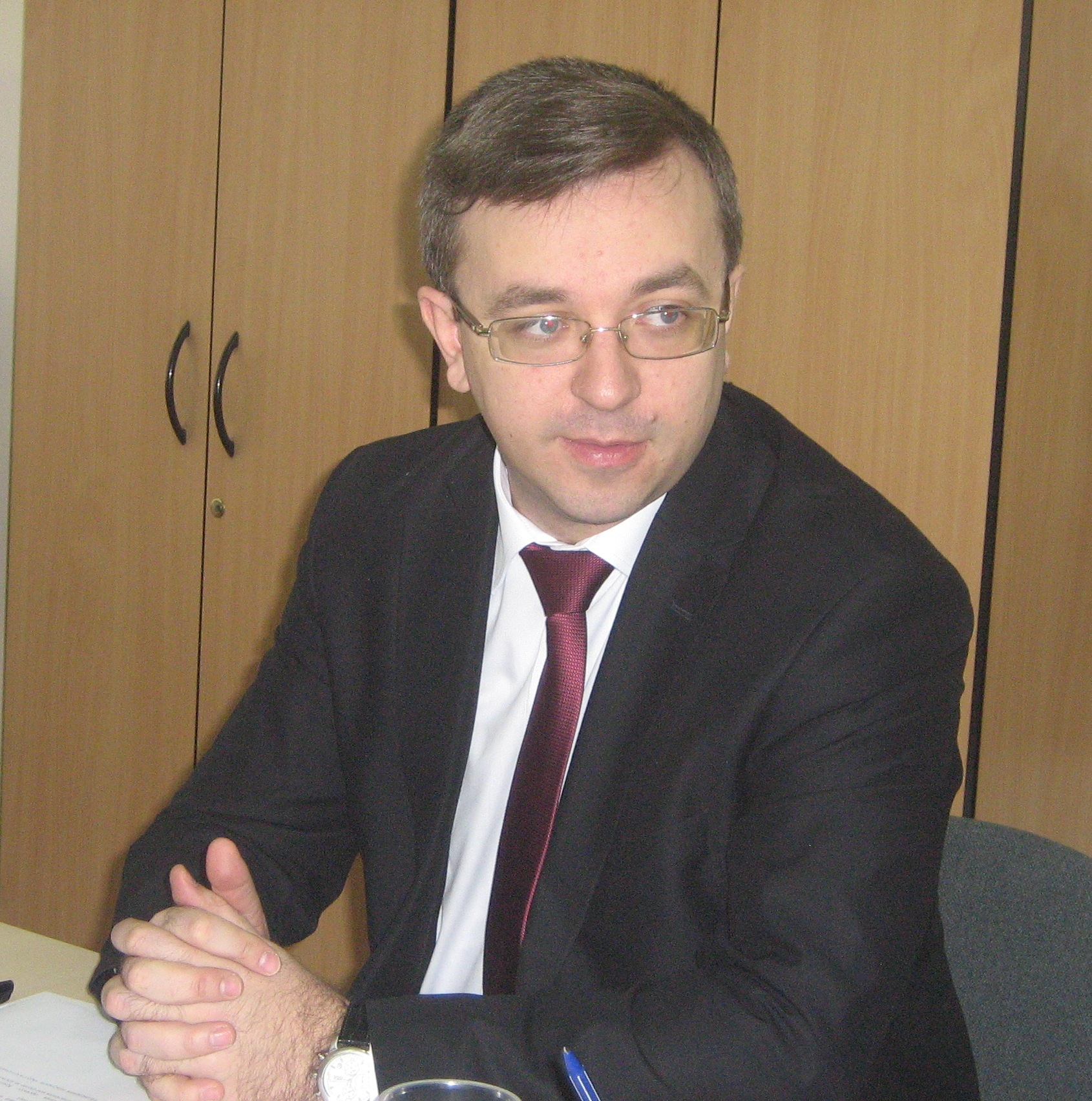 Goncharenko M. F.